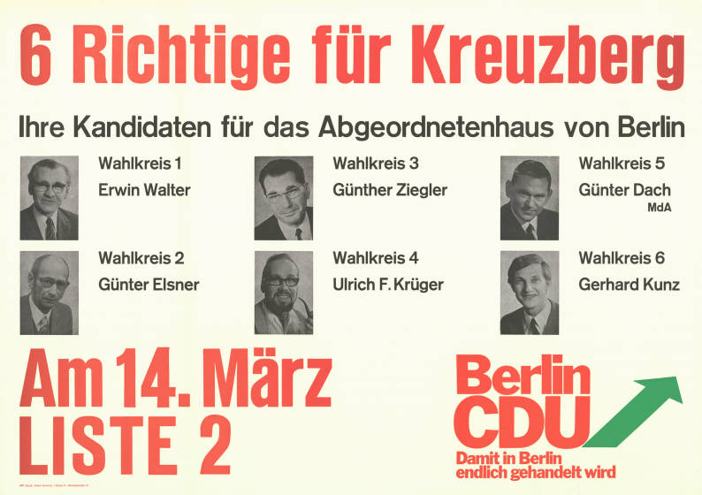 6 Richtige für Kreuzberg Ihre Kandidaten für das Abgeordnetenhaus von Berlin Wahlkreis 1 Erwin Walter Wahlkreis 2 Günter Elsner Wahlkreis 3 Günther Ziegler Wahlkreis 4 Ulrich F. Krüger Wahlkreis 5 Günter Dach MdA Wahlkreis 6 Gerhard Kunz Am 14. März Liste 2 Berlin CDU Damit in Berlin endlich gehandelt wird Abbildung: Porträtfotos Plakatart: Kandidaten-/Personenplakat mit Porträt Drucker_Druckart_Druckort: 1971 Druck: Albert Hentrich, Berlin-Steglitz Objekt-Signatur: 10-004 : 384 Bestand: Plakate zu Abgeordnetenhauswahlen Berlin (10-004) GliederungBestand10-18: Plakate zu Abgeordnetenhauswahlen Berlin (10-004) » CDU Lizenz: KAS/ACDP 10-004 : 384 CC-BY-SA 3.0 DE